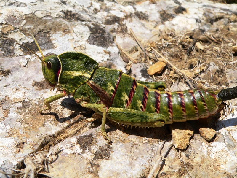 Pamphagus marmoratusSerre della Pizzuta (Palermo, Italy)